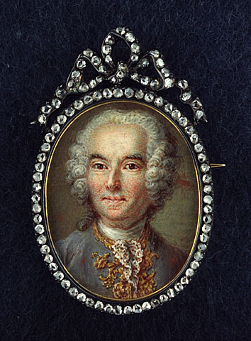 Title / Titre : Possibly Colonel Bartholomew Gugy / Peut-être le colonel Bartholomew Gugy Creator(s) / Créateur(s) : Unknown / Inconnu Date(s) : ca. 1733-1766 Reference No. / Numéro de référence : MIKAN 2837544 / C-100666 Credit / Mention de source : Library and Archives Canada, C-100666 / Bibliothèque et Archives Canada, C-100666 Description / Descriptions : Lieutenant Colonel Bartholomew Gugy (flourishing late seventeenth/early eighteenth century) is said to have been a Swiss officer in the Dutch Army. His son Conrad was a member of the British Army who came to Canada in 1759 and settled in Canada leaving his estate to his younger brother Barthélemi. Barthélemi and his son Louis came to Canada in 1786. Louis was active in the militia of Lower Canada during the War of 1812 and was a member of the Legislative Assembly of Lower Canada. / On dit que le lieutenant-colonel Bartholomew Gugy (période florissante de la fin du XVIIe au début du XVIIIe siècle) était un officier suisse dans l'armée hollandaise.Son fils Conrad était enrôlé dans l'armée britannique et vint s'établir au Canada en 1759, laissant ses biens à son frère cadet Barthélemi. Ce dernier et son fils Louis arrivèrent au Canada en 1786. Louis fut soldat dans la milice du Bas-Canada durant la guerre de 1812 et député à l'Assemblée législative du Bas-Canada.